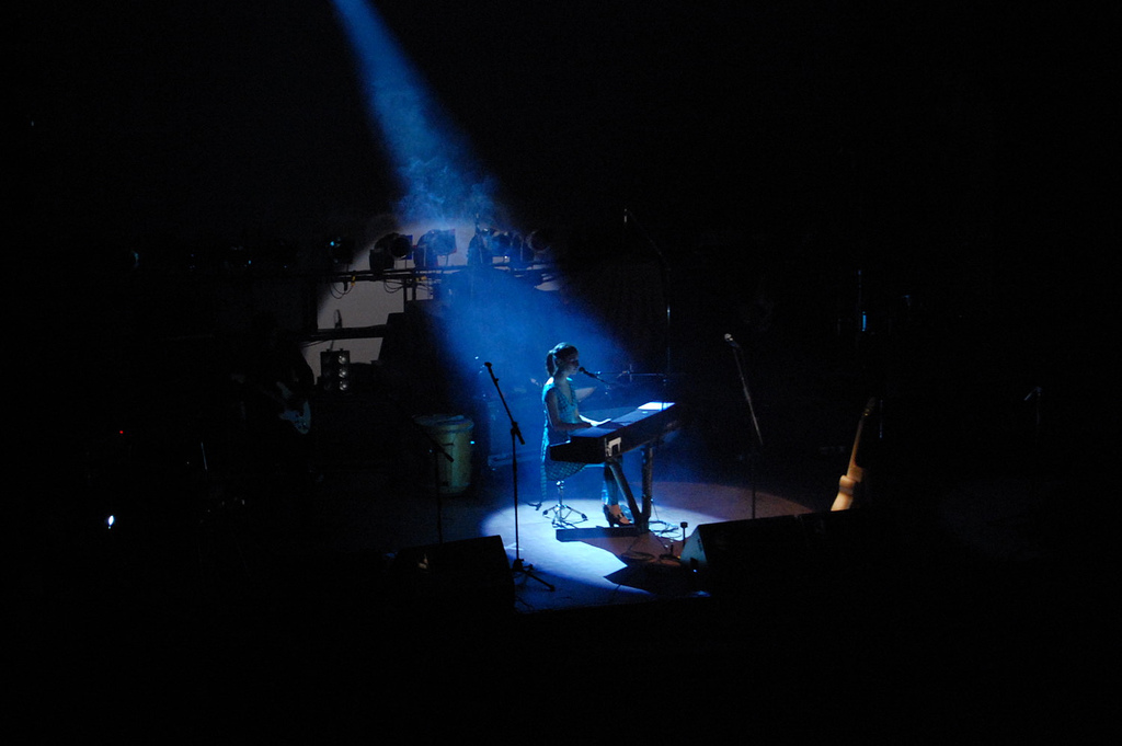 Francisca Valenzuela